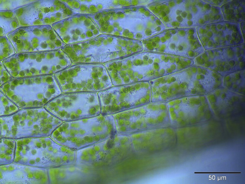 Wetteranzeigendes Drehmoos (Funaria hygrometrica), Laminazellen, 400x vergrößert